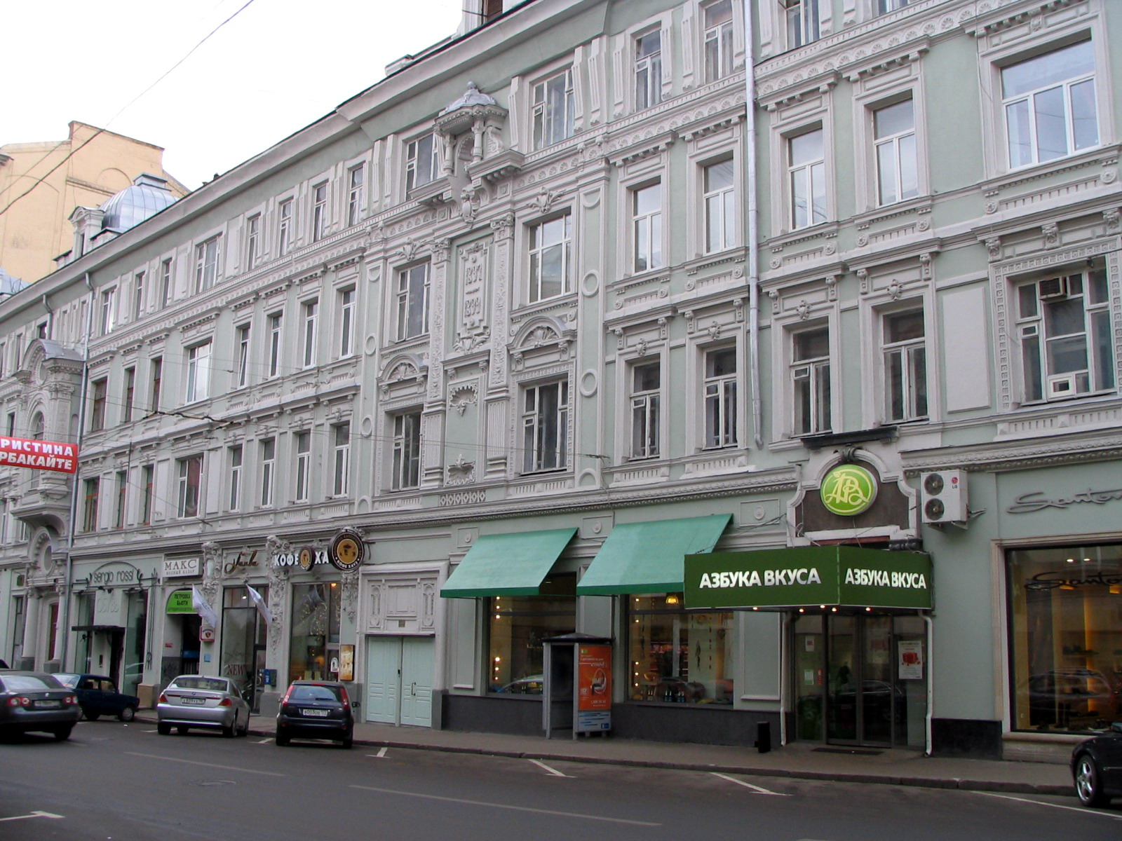 Petrovka Street, 17. Moscow